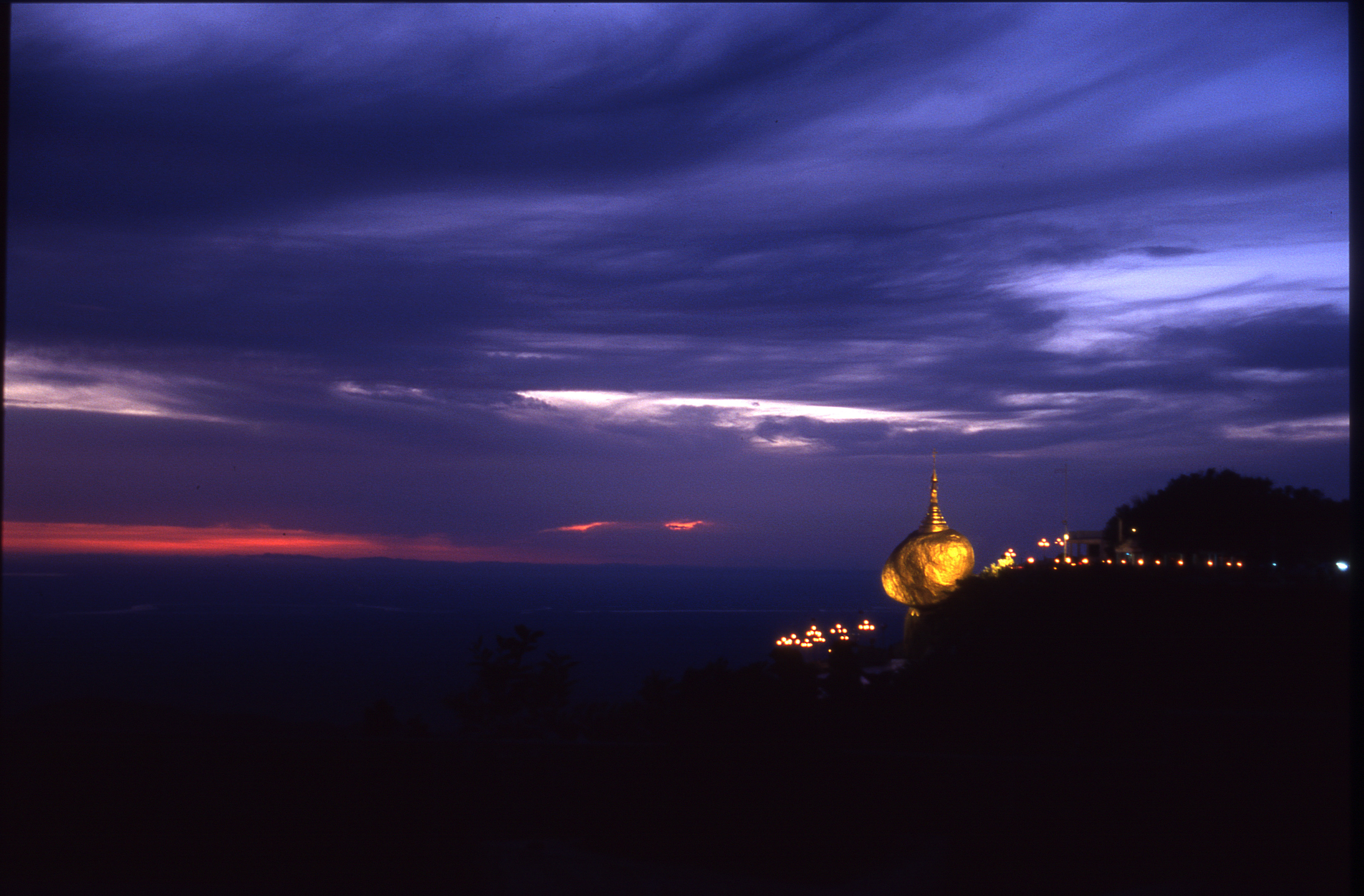 Birmanie, le rocher d'or